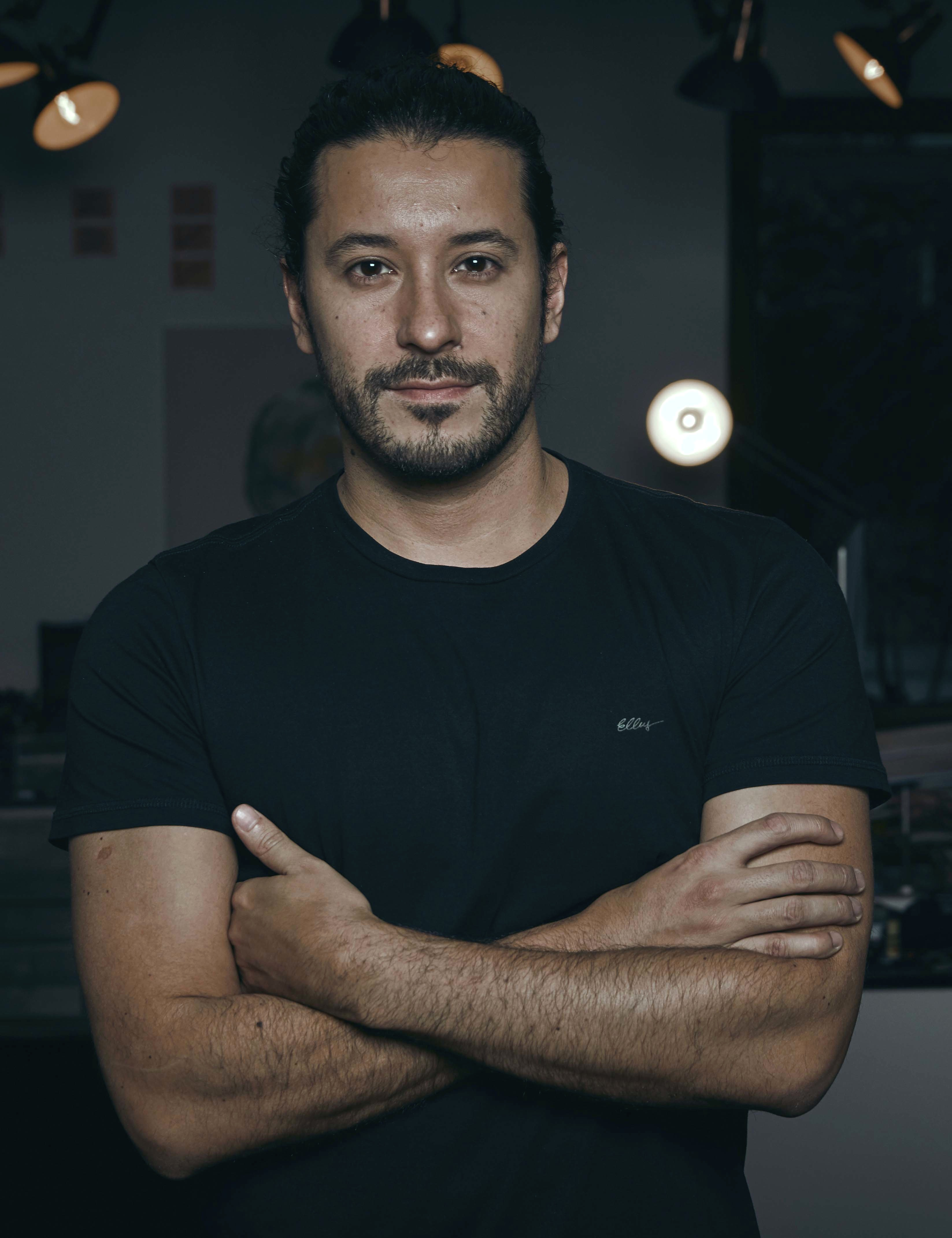 Rafael Grampá em seu estúdio Handquarters